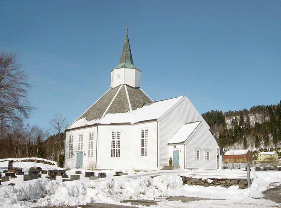 Kleive and the Kleive kirke